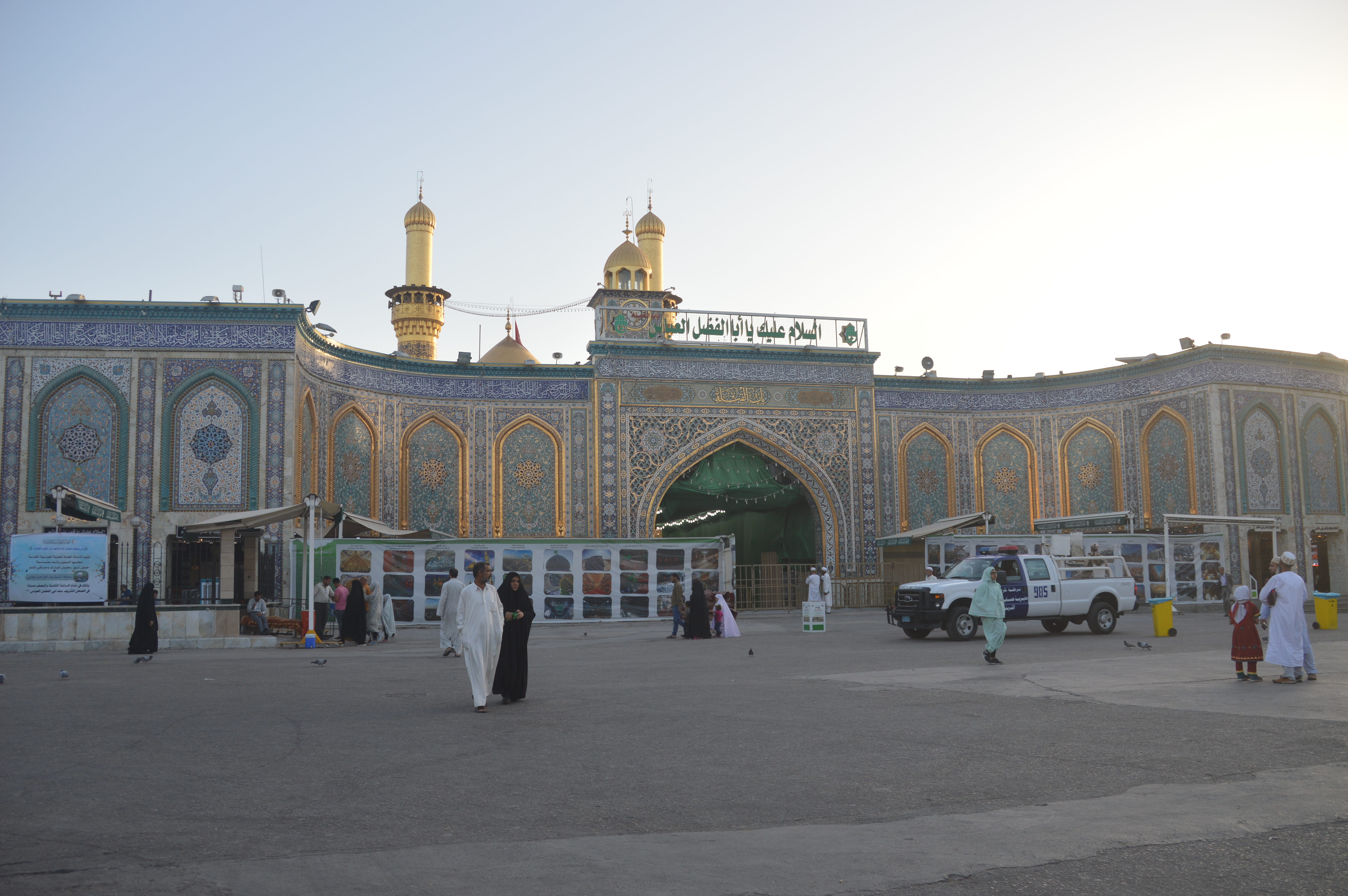 العتبة العباسية وهو المكان الذي دفن فيه العباس بن علي في كربلاء في العراق بعد معركة كربلاء عام 61 هـ يقصده الشيعة من كل مكان لزيارته والتبرك بمرقده.